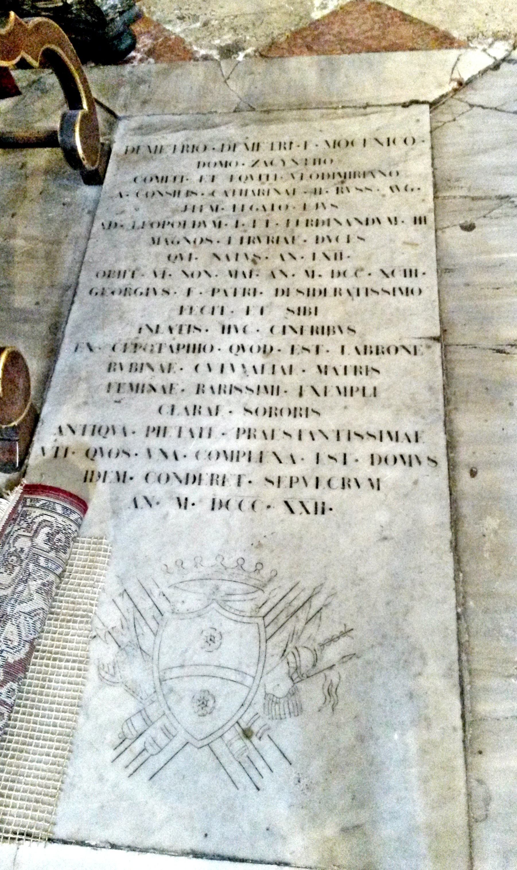 Grabstein von Demetrio Mocenigo I. del Zante (von Zakynthos)